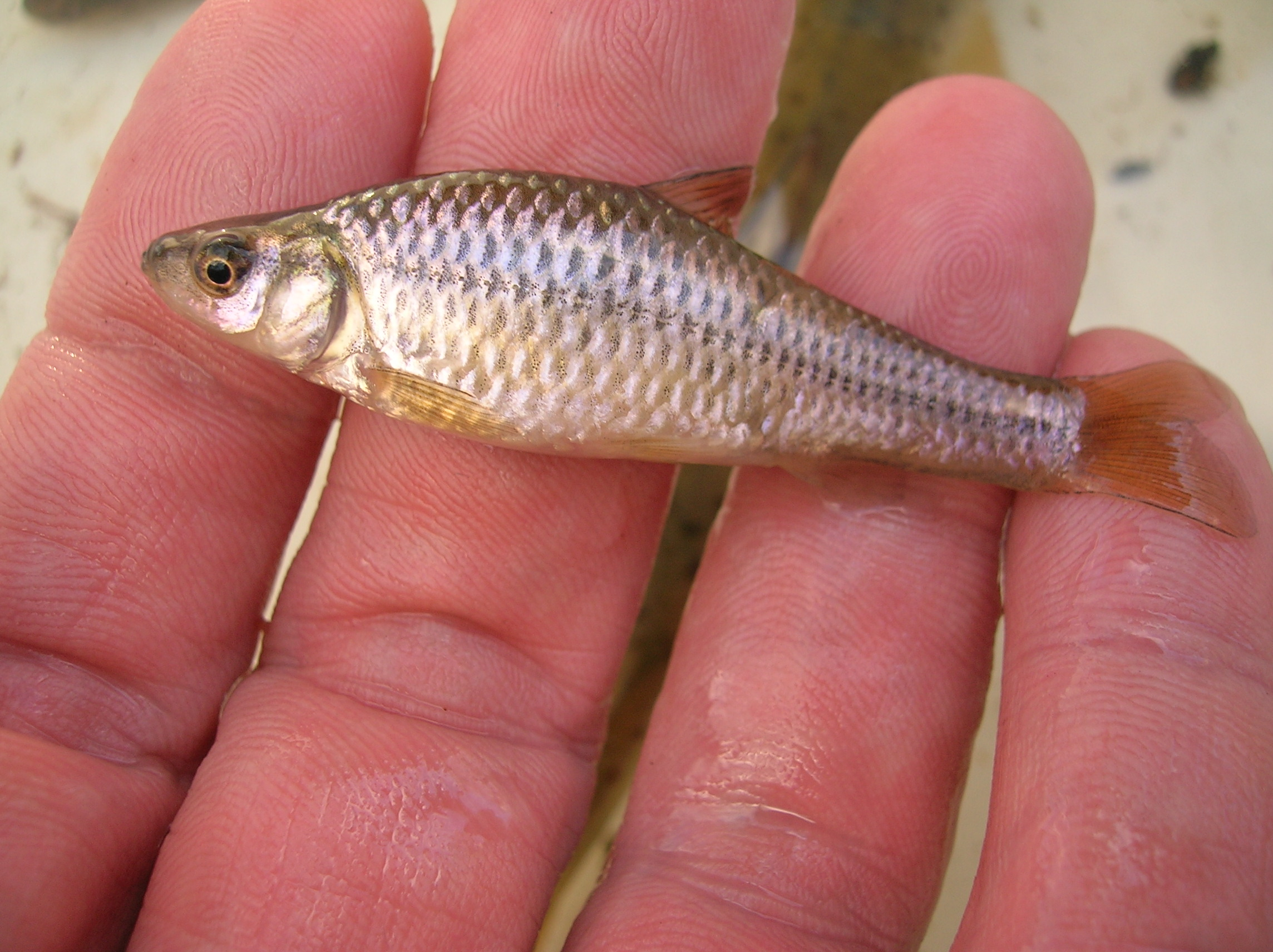 Pseudorasbora parva Limburg Belgium